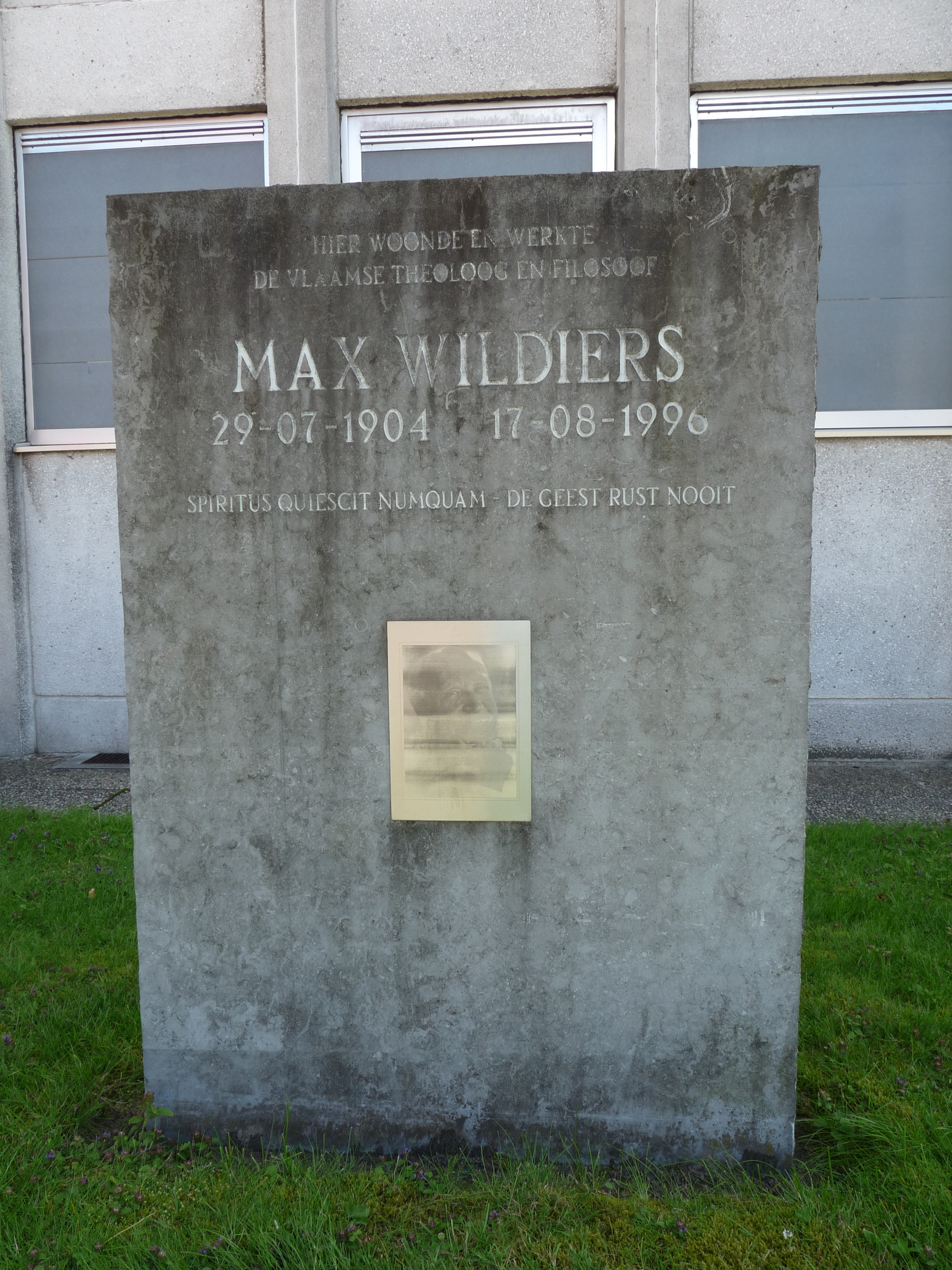 Deze gedenkplaat in de buurt van de kerk van Sint-Job-in-'t-Goor werd opgericht op de plaats waar Max Wildiers woonde. Aangebracht zijn naast zijn biografische data ook zijn lijfspreuk.